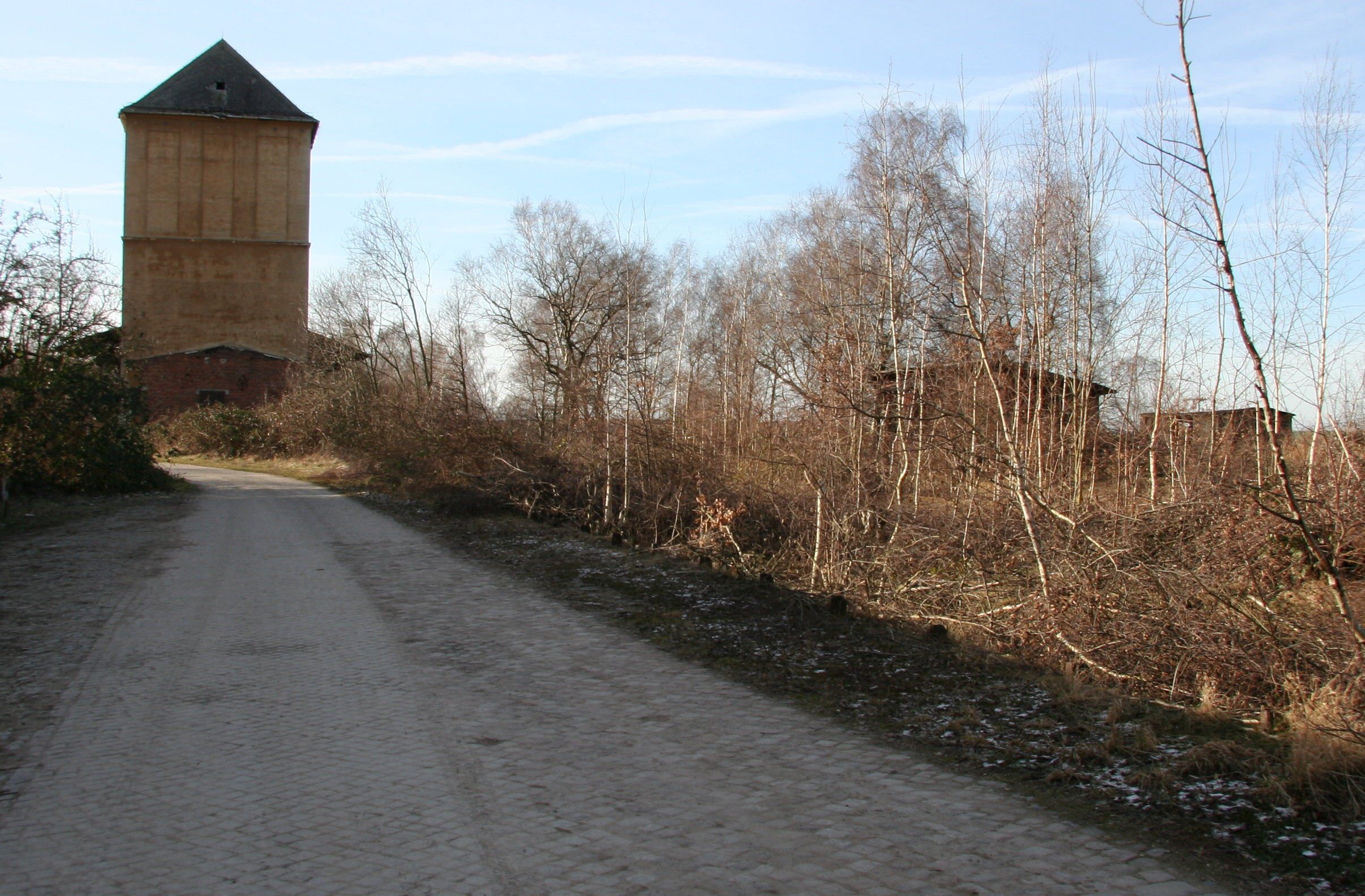 Bahnhofsgelände Wernsdorf, Bahnstrecke Altenburg–Langenleuba-Oberhain